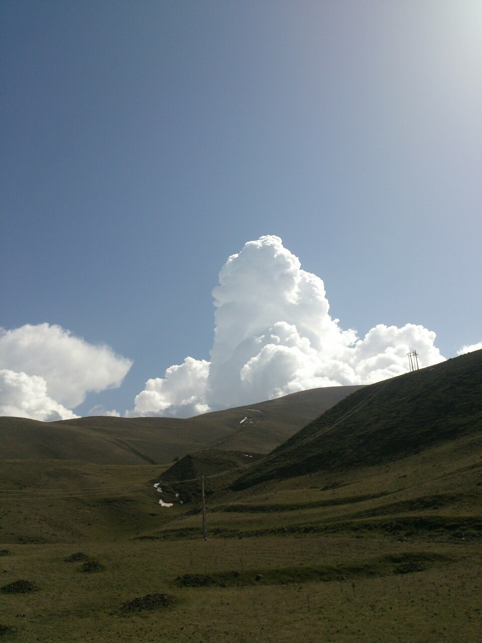 ابرهای برجی شکل